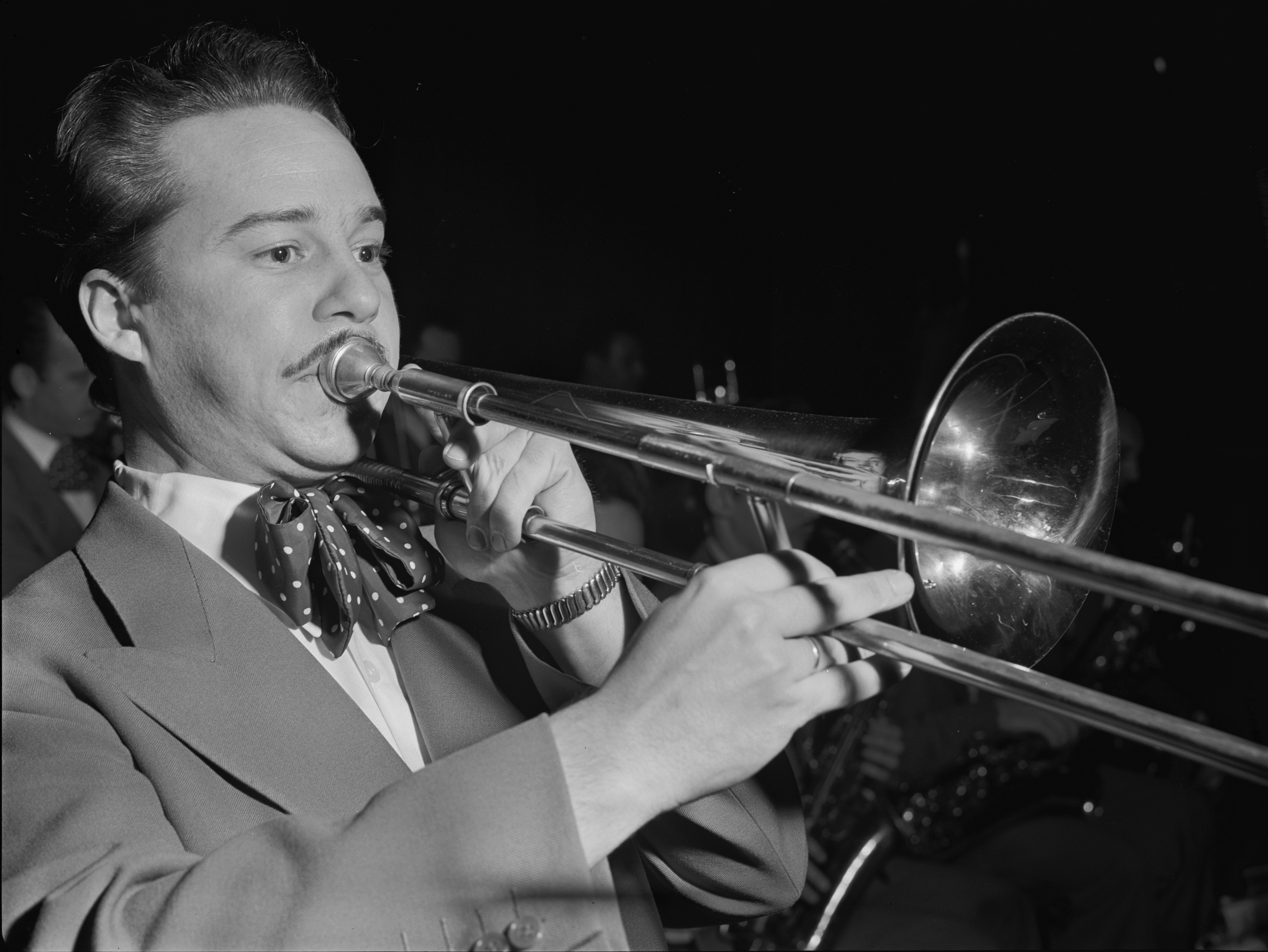 Jazz trombonist Eddie Bert